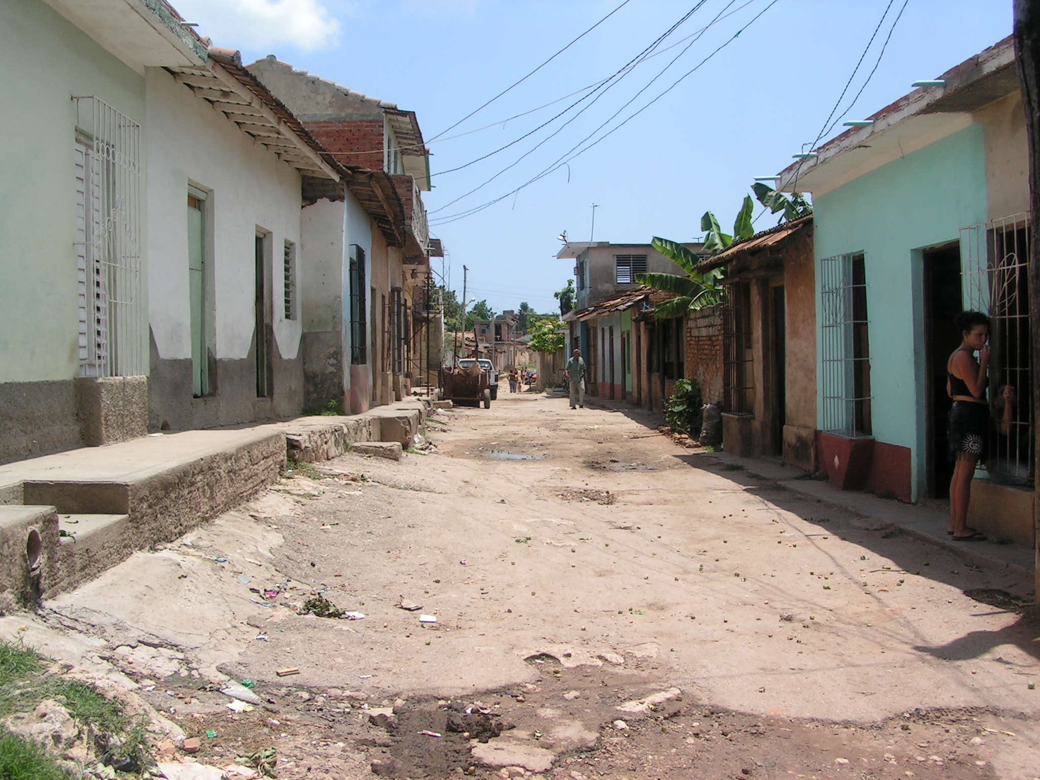 Rue typique de Trinidad, Cuba.